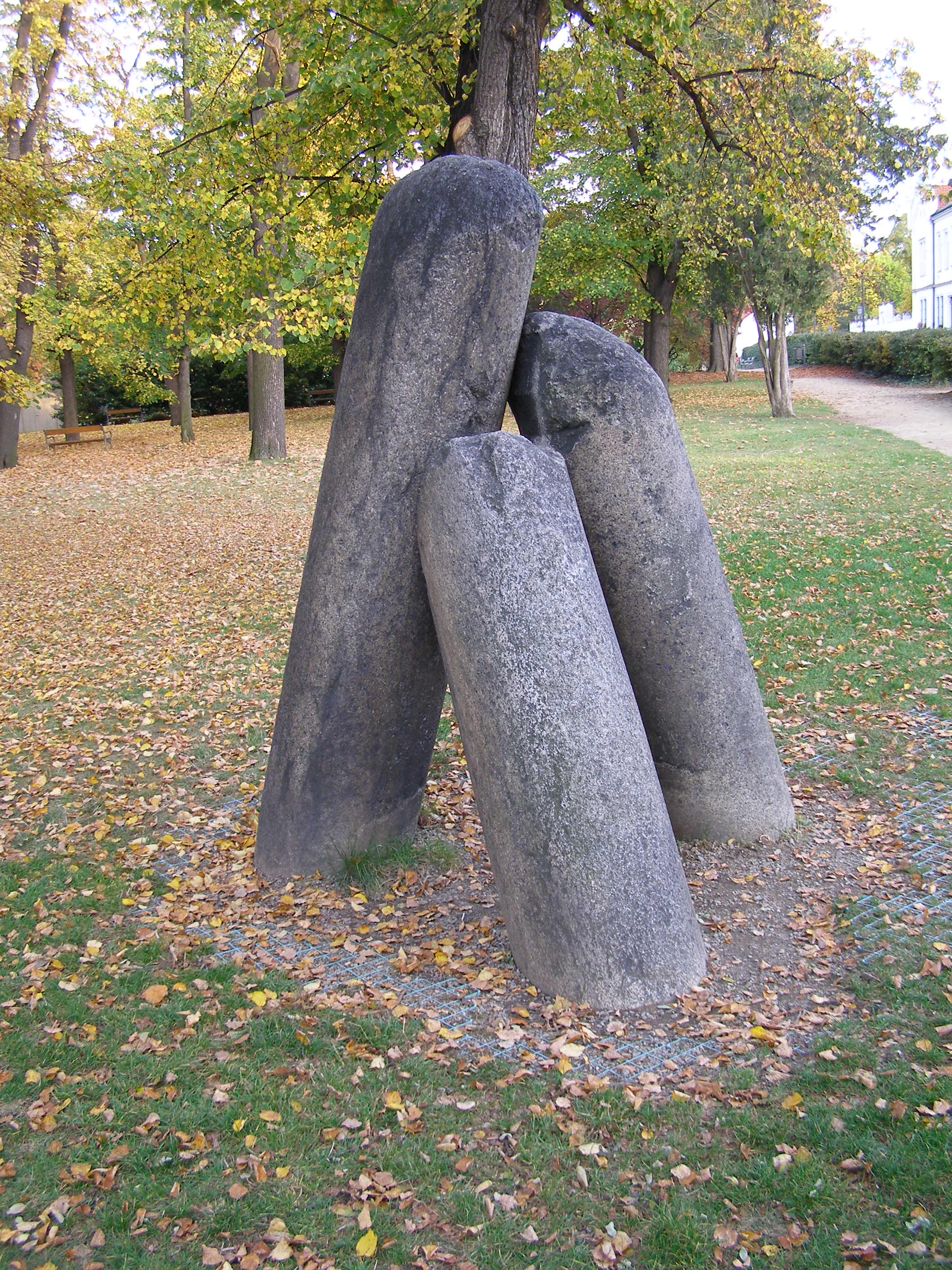 Pevnost Vyšehrad, Praha 2-Vyšehrad, Soběslavova 14/1, V pevnosti 16/2, 35/11, K rotundě 16/3, 81/6, 82/8, 90/12, 91/14, 92/16, 100/10, Štulcova 89/1, 102/2, 69/3